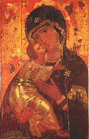 Владимирская икона Византия